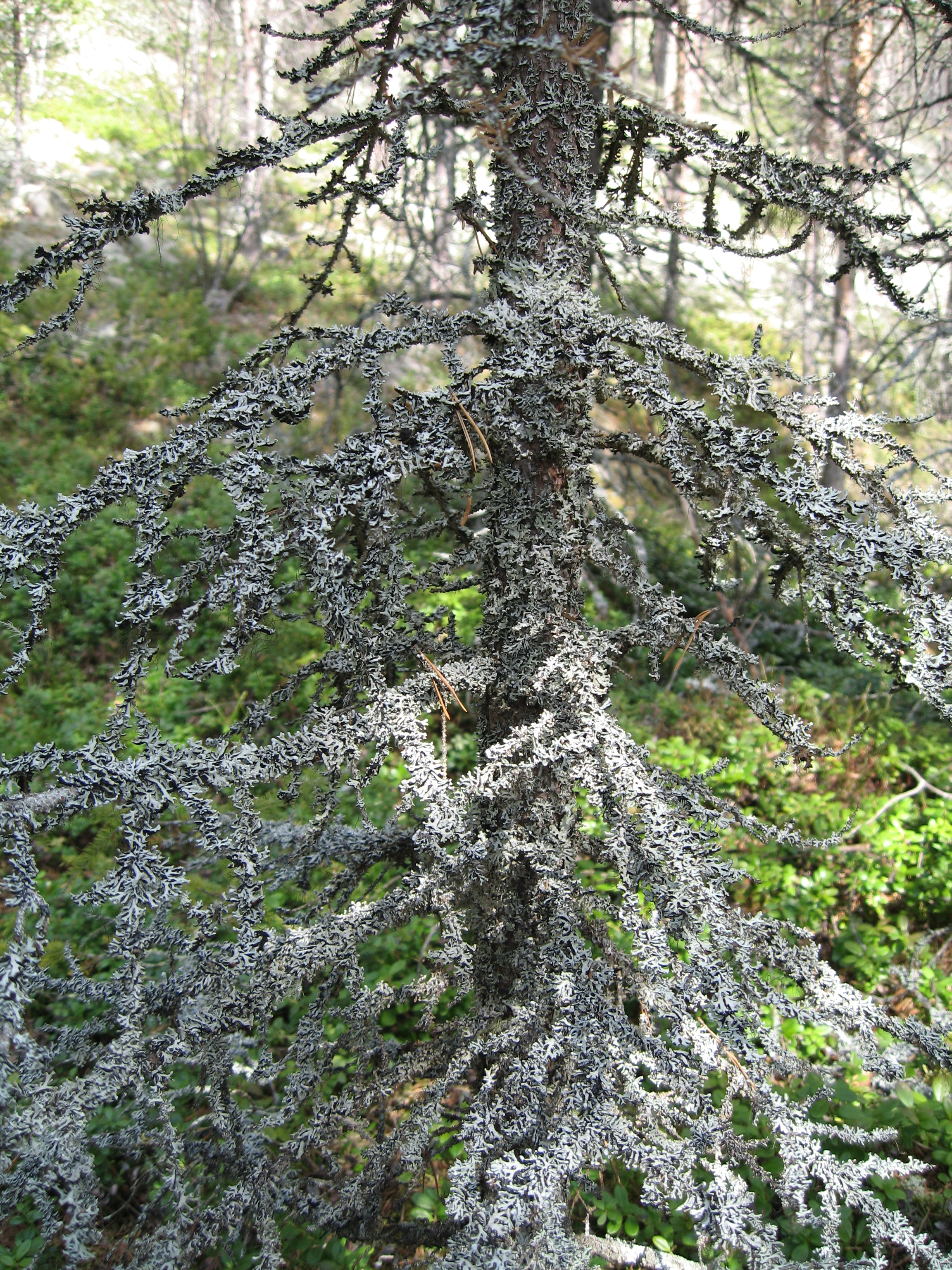 Kvistlav